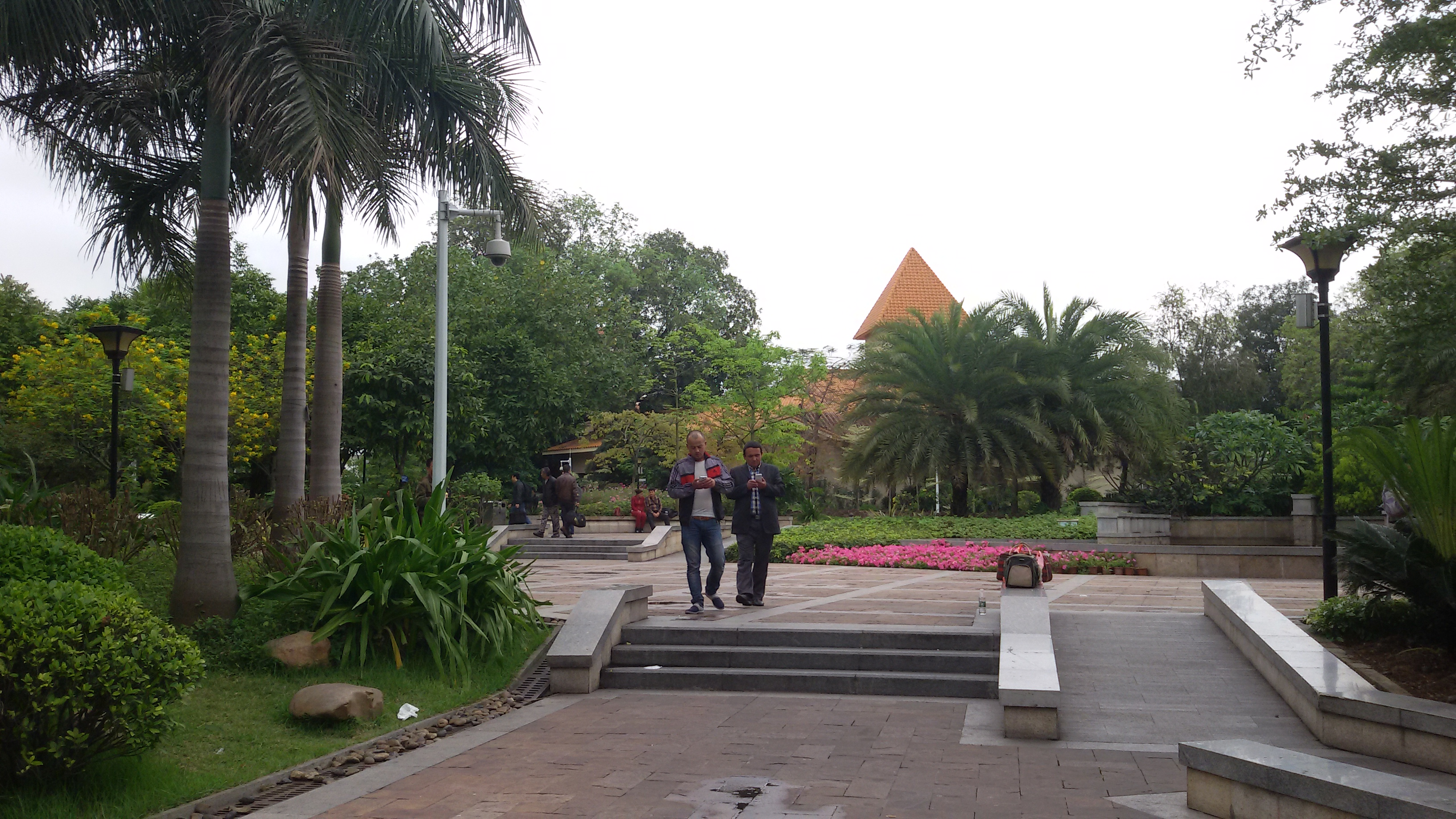 粵語: 广州草暖公园